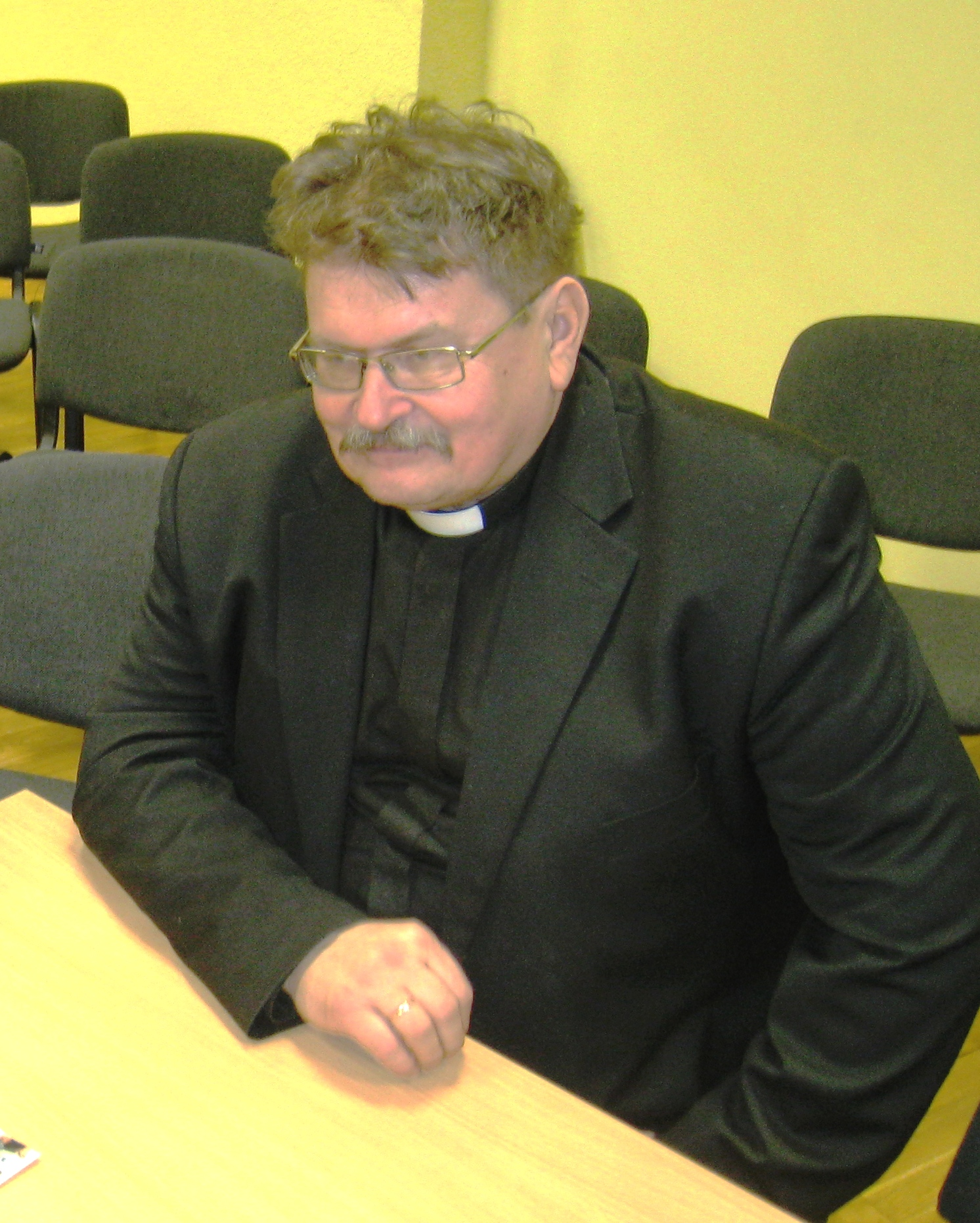 Villu Jürjo